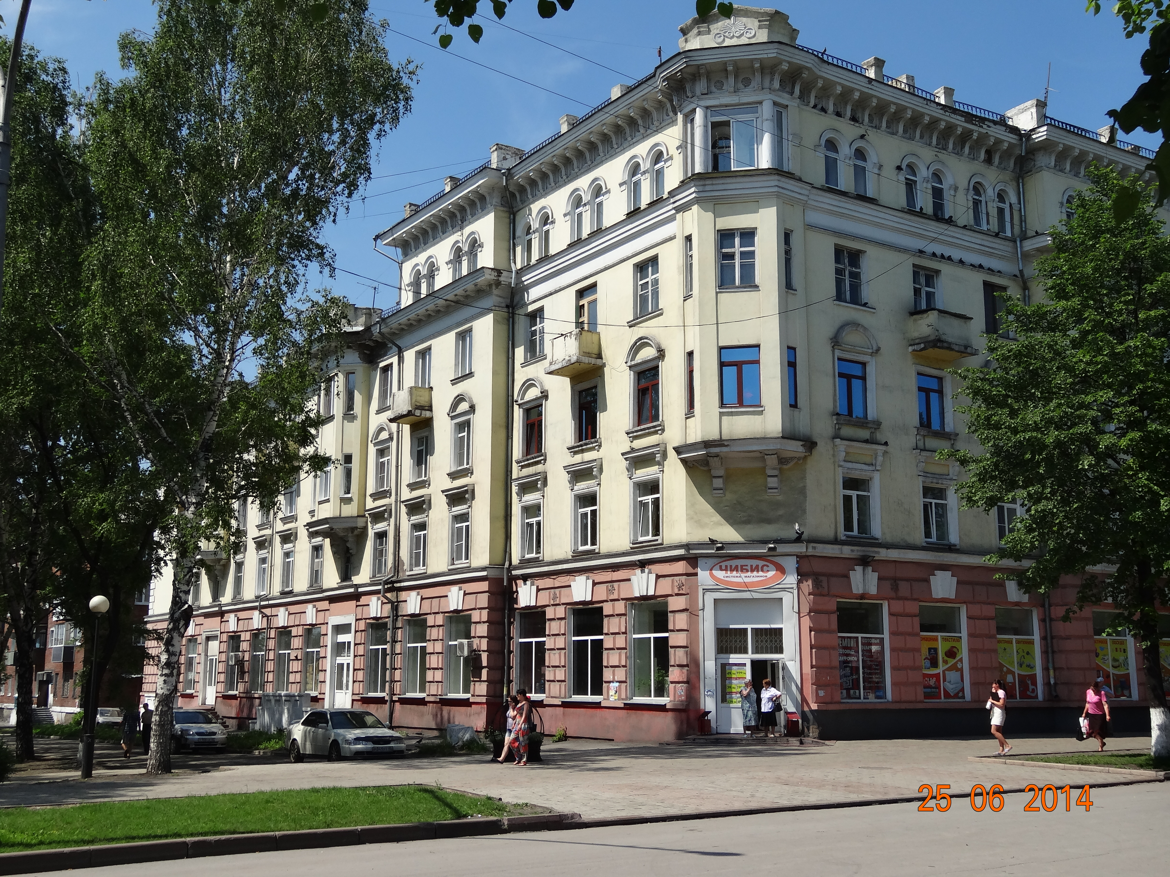 Универмаг (был)